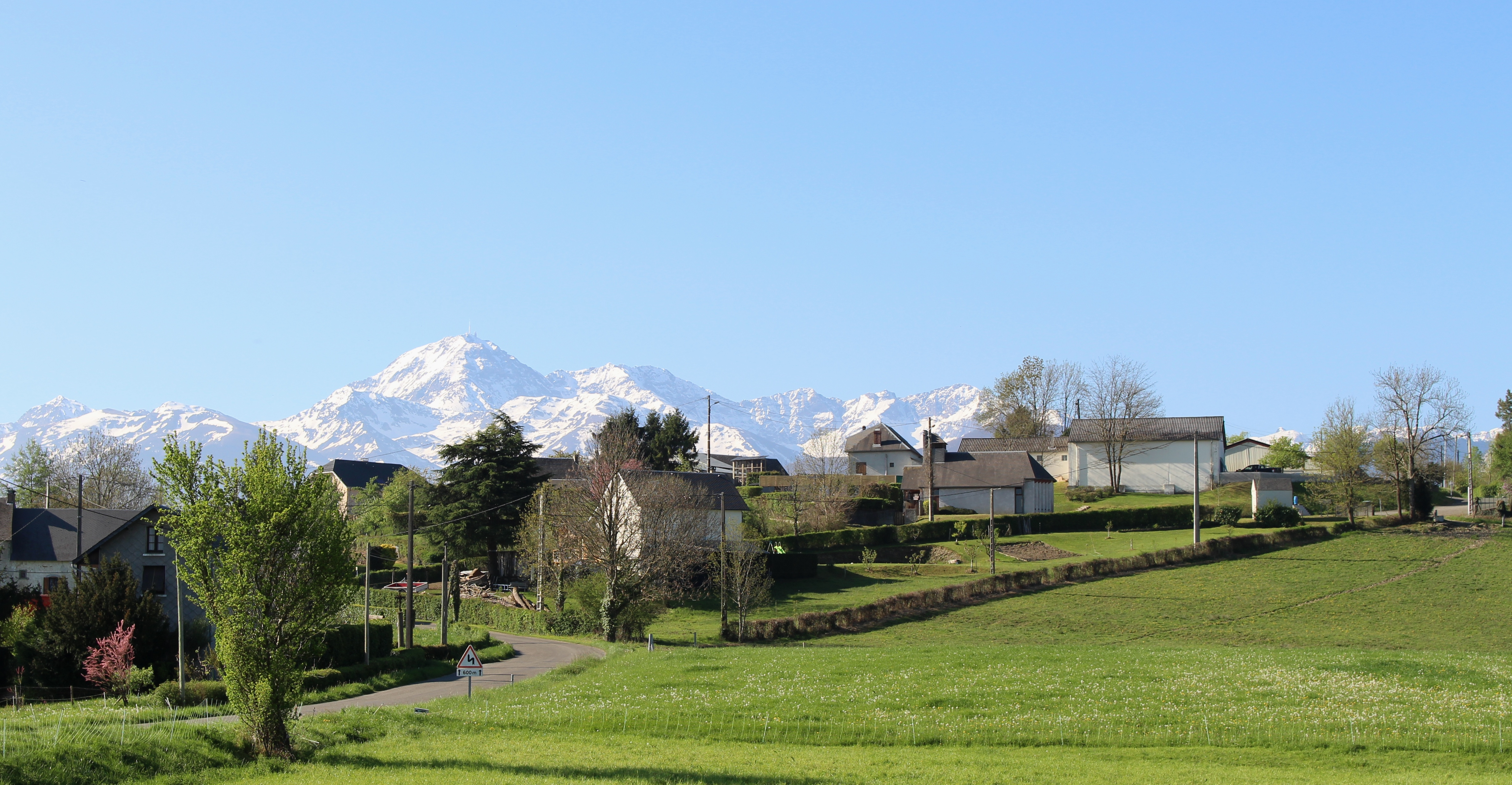 Hauban (Hautes-Pyrénées)